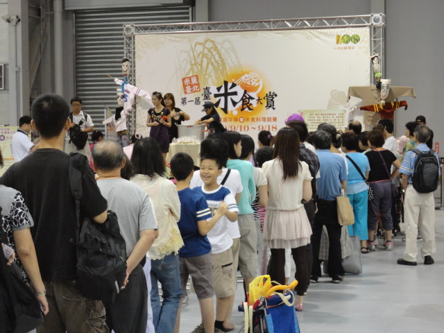 中文（台灣）: 臺北市花博公園爭艷館，臺北市政府主辦第一屆臺北米食大賞。